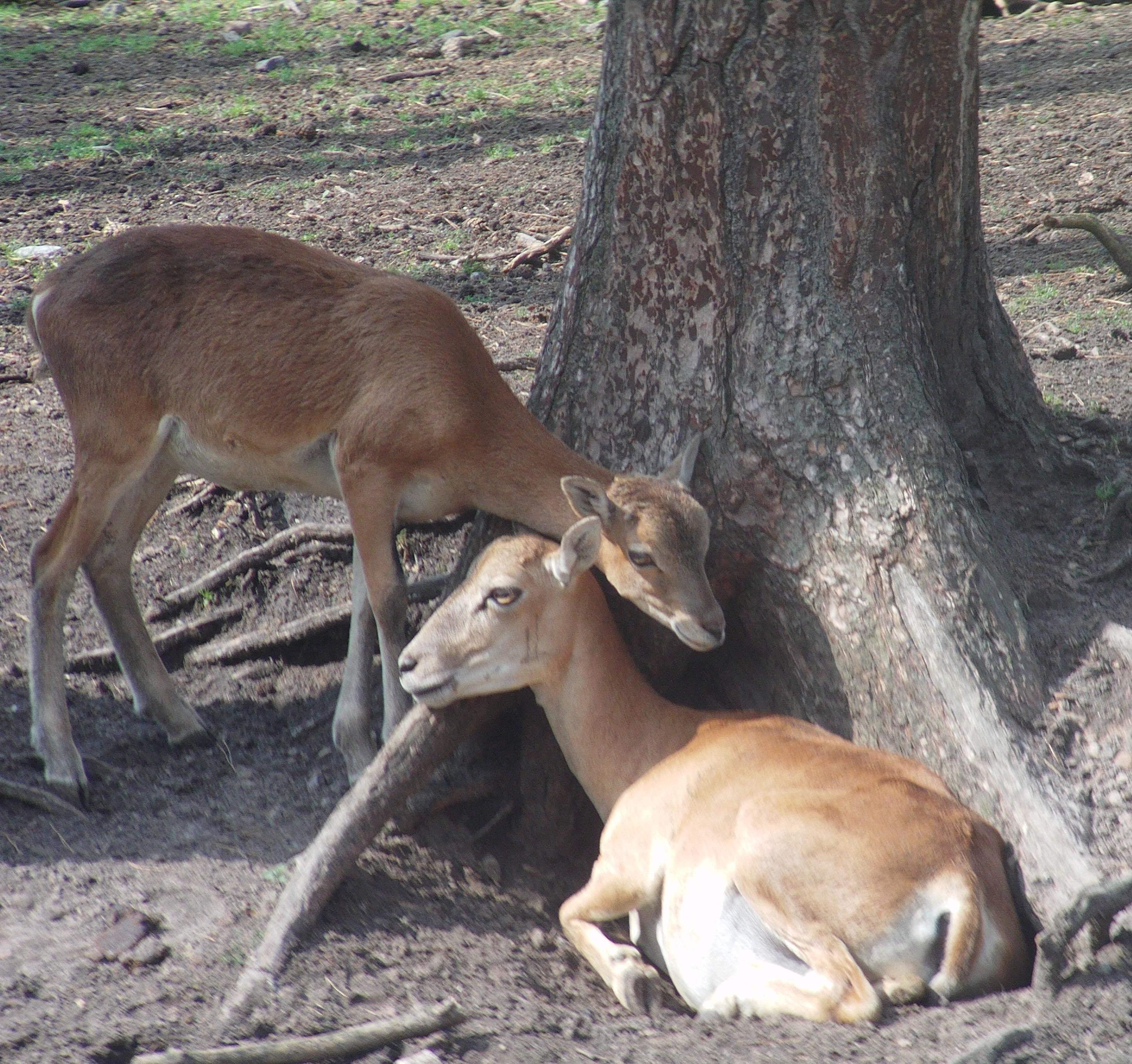 Ein Muffellamm mit seiner Mutter